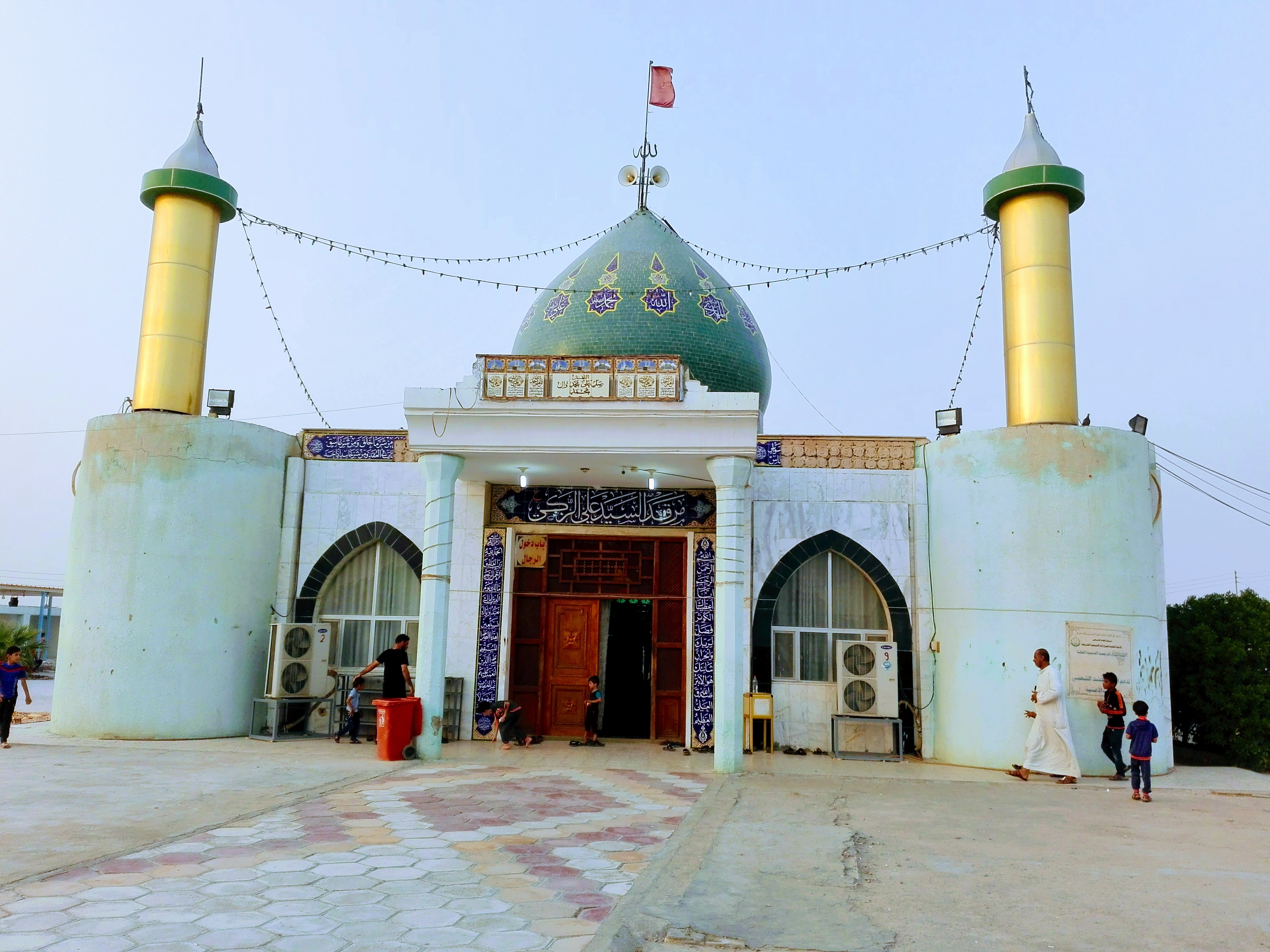 تصويري الخاص، لمرقد علي الزكي من الخارج